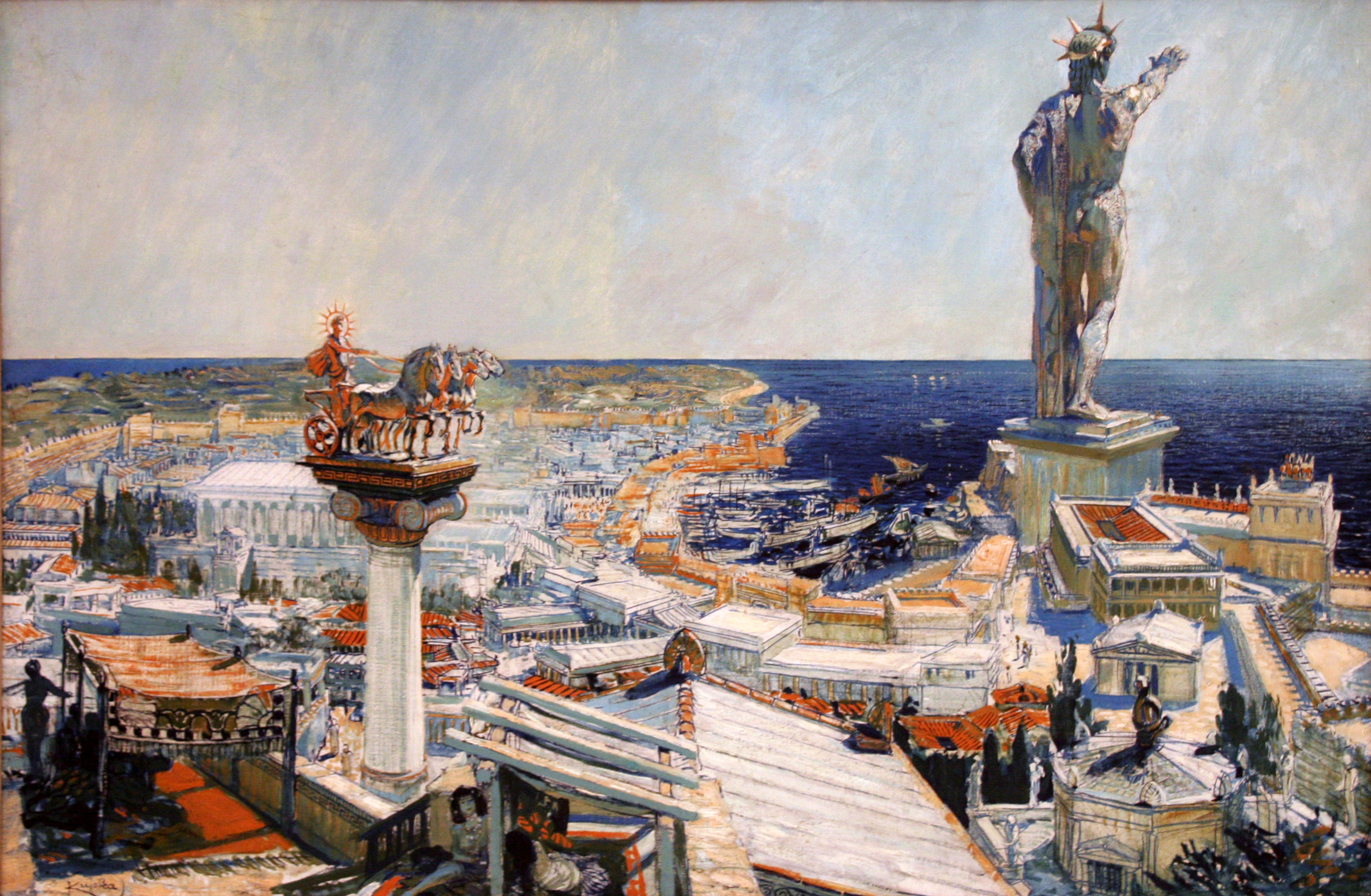 Representación de la ciudad de Rodas, con el Coloso al fondo.